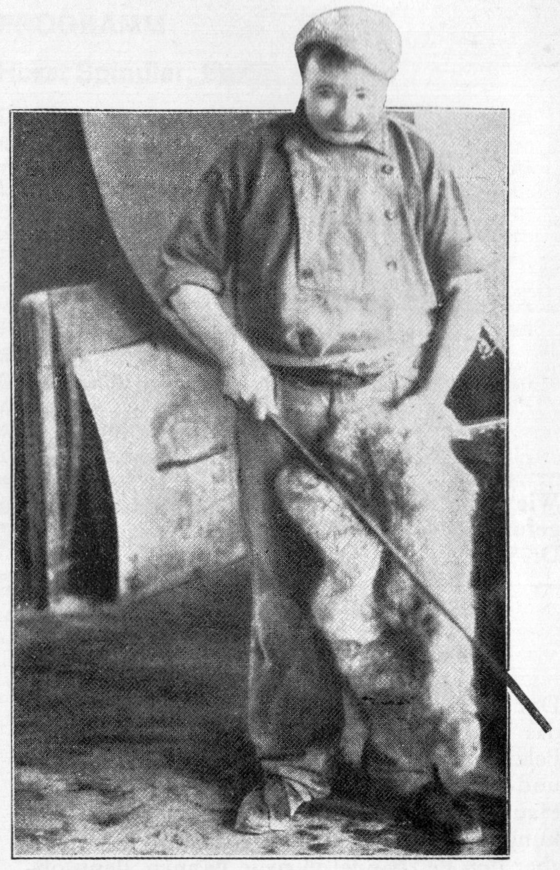 Pelz-Zurichter bei der Arbeit, 1911. (originale Bildunterschrift): Die Felle werden geklopft